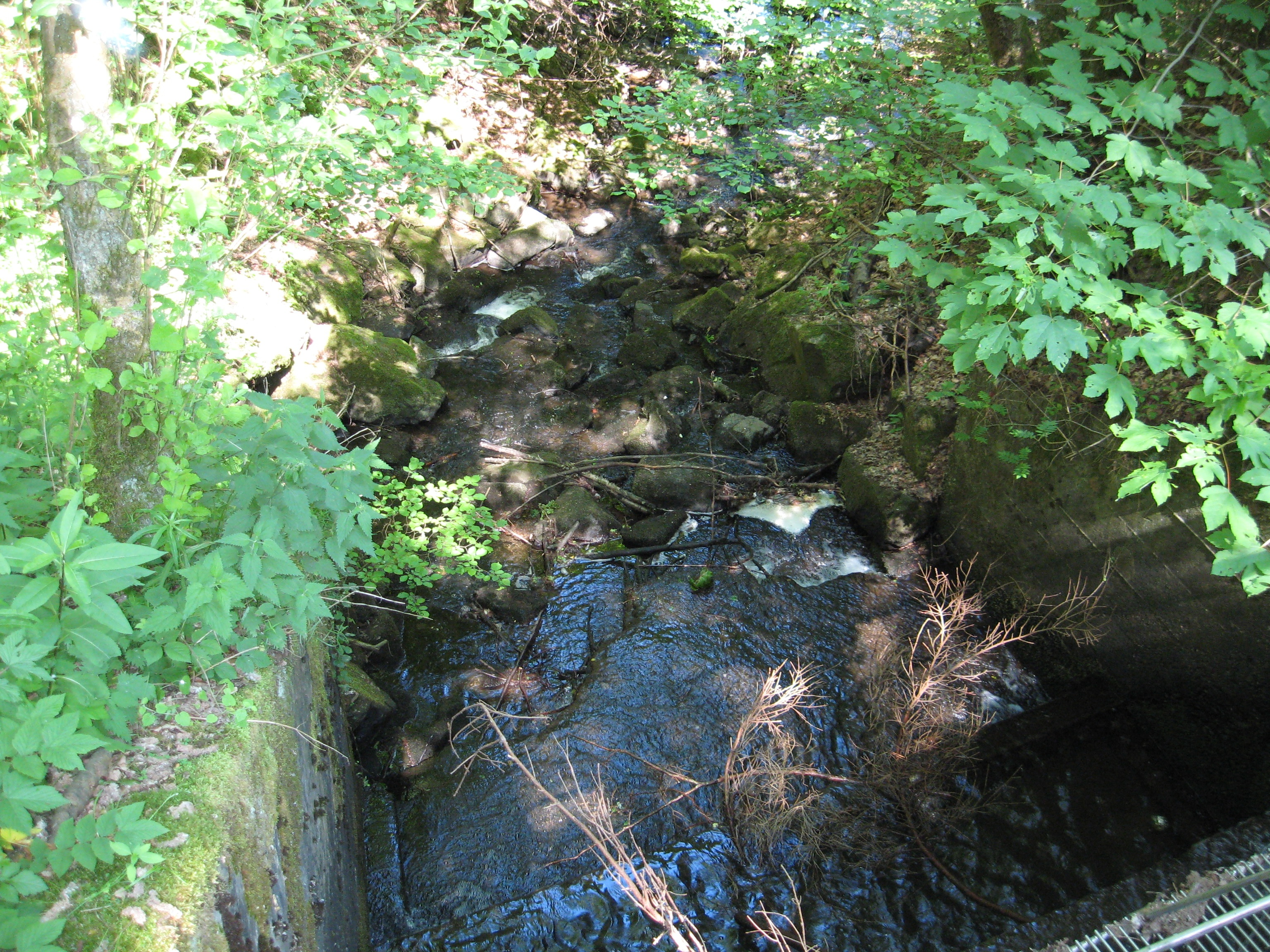 Abfließendes Wasser des Landeskroner Weihers bei Wilden.